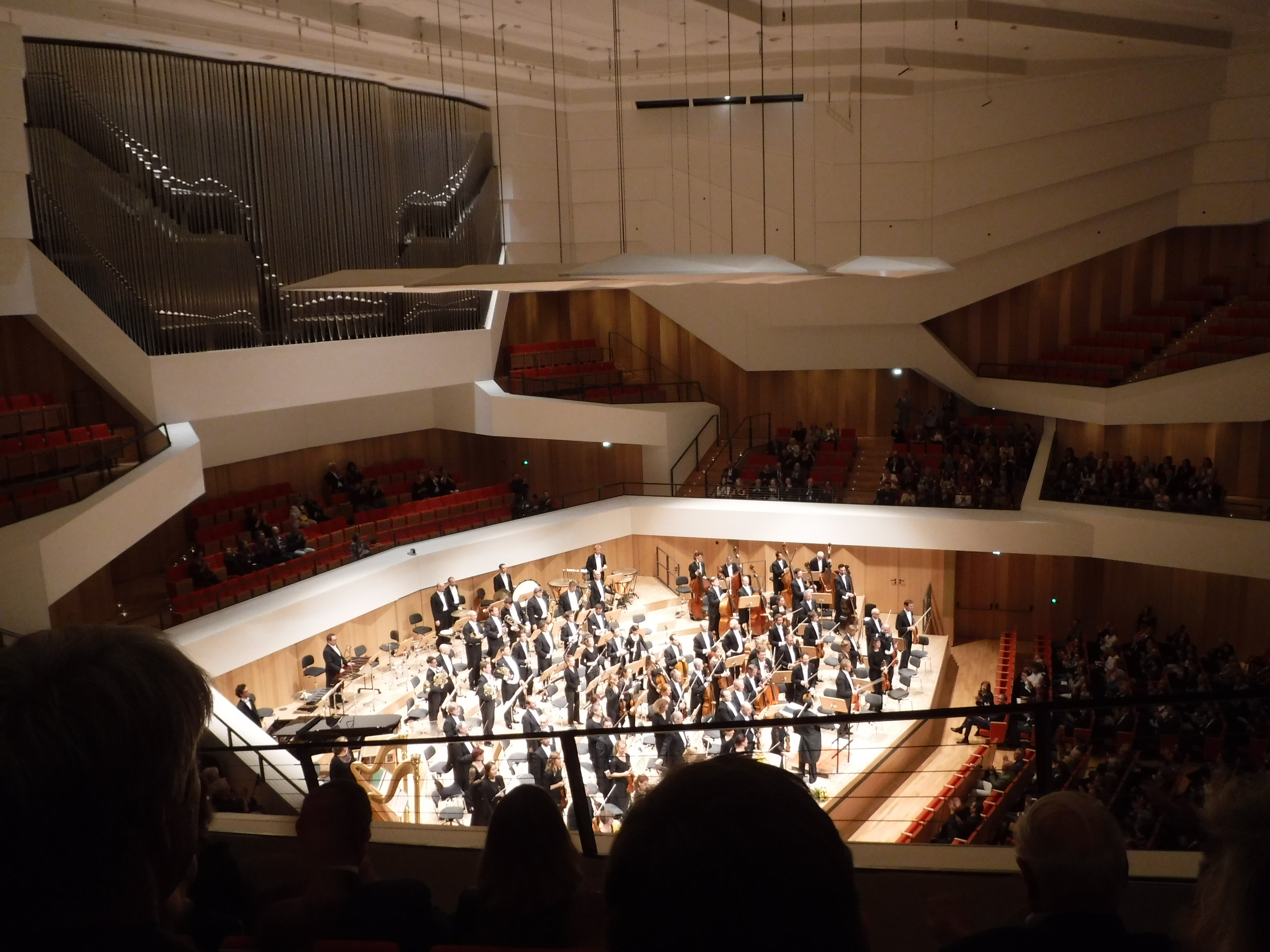 Dresdner Philharmonie im Kulturpalast, Dirigent: Charles Dutoit